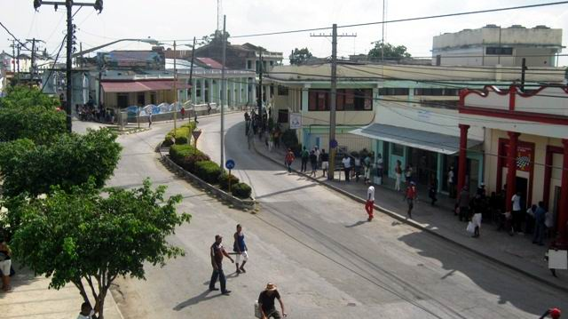 Fotografía desde la casa de la Cultura la Maya.